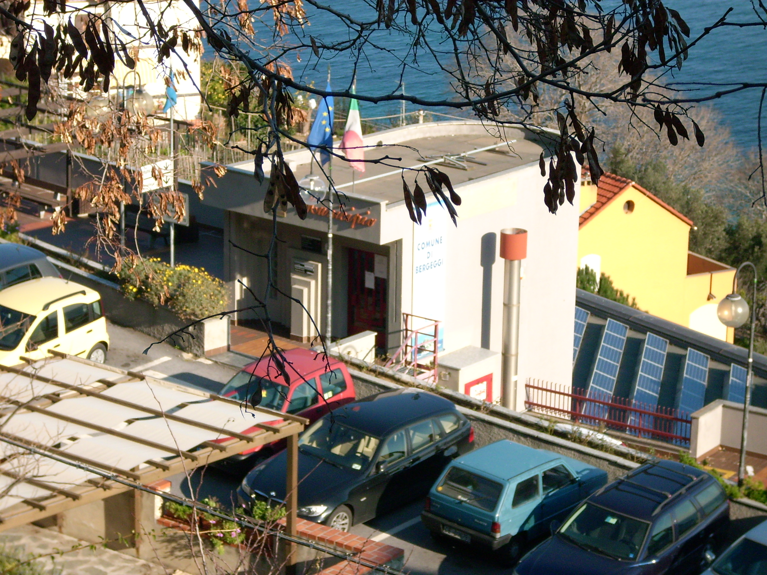 Municipio di Bergeggi, Liguria, Italy